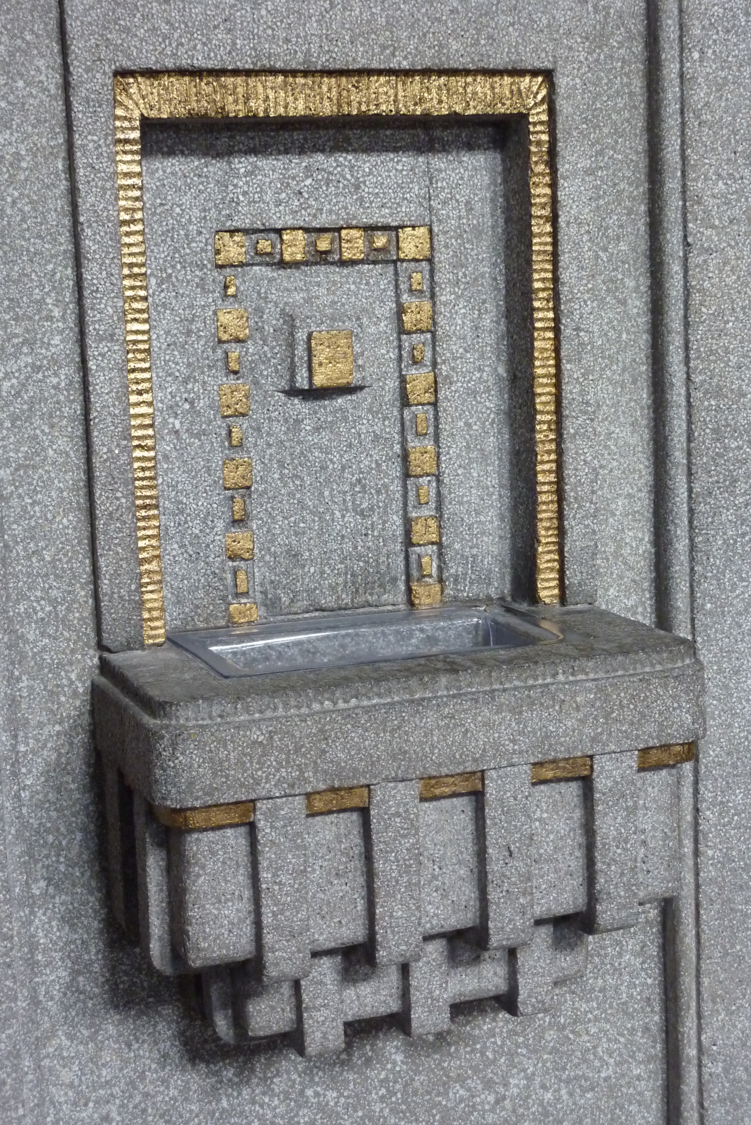 katholische Kirche St. Georg in Hockenheim, Weihwasserbecken